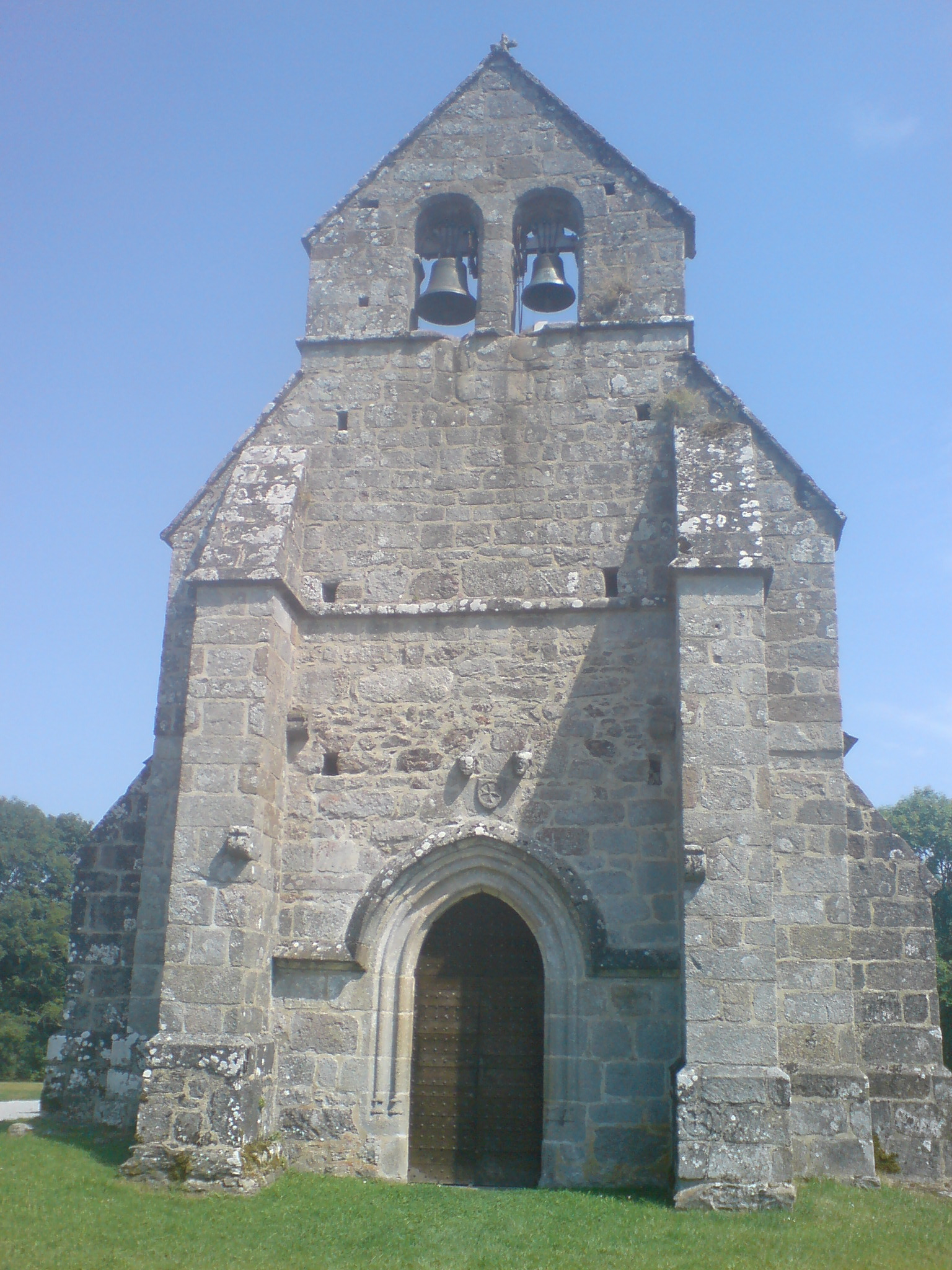 Façade de l’église de Courteix, initialement chapelle templière, du XIIIe siècle. Le portail est postérieur ; croix de Malte ; culots sculptés de visages humains.